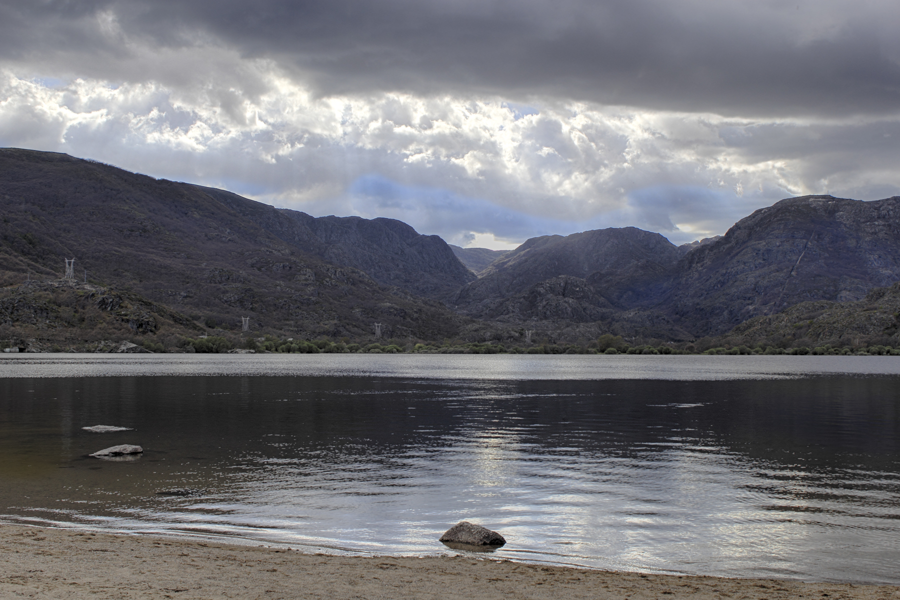 Lago de Sanabria Parque natural del Lago de Sanabria y Alrededores Provincia de Zamora Castilla y León España